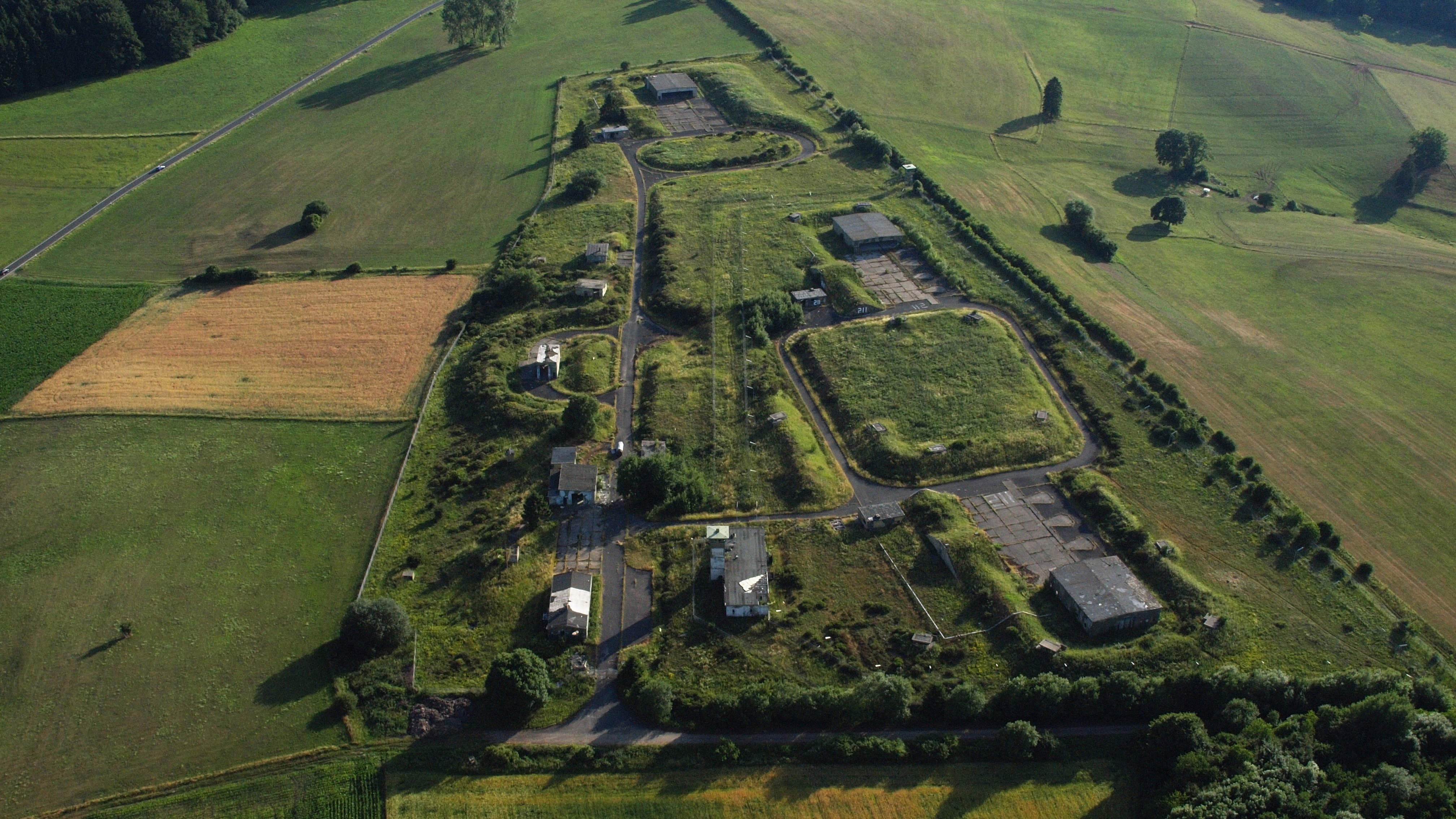 Ehemalige Nike-Hercules-Raketenstellung zwischen Mülheim und Reetz (beide Orte in der Gemeinde Blankenheim, Eifel, NRW), Luftaufnahme (2015), wunderbare Aufnahme. Gut zu erkennen sind die 3 x 3 Abschussplätze samt Hallen im rechten bzw. hinteren Bereich der Stellung. Man kann auch eine doppelte Umzäunung erkennen, die sich - vom Wachtgebäude (vorne Mitte) mit dem großen Turm ausgehend - um den vorderen rechten Bereich mit zwei Abschussplätzen erstreckt. An seinem rechten hinteren Ende steht der zweite Wachtturm, ein dritter befindet sich vorne rechts außerhalb des Bildes. In diesem besonders gesicherten Bereich befanden sich zwei Bunker mit insgesamt zehn Atomsprengköpfen für die Nike-Raketen: dort wo 211 draufsteht und sowie ein Stück weiter vorne. Direkt daneben ist jeweils noch mal 211 auf dem Betonboden zu sehen und diente als Landemarke für die Transporthubschrauber vom Typ CH-47 Chinook, die die Atomsprengköpfe direkt an den Bunkern ablieferten bzw. abholten. Diese Transporte geschahen auch während der Betriebszeit und gingen ins zentrale Atomwaffenlager nach Ramstein, wo die nuklearen Sprengköpfe gewartet wurden. Auf dem Wachtgebäude ist ein großes weißes Dreieck zu sehen, das in Richtung der Hubschrauber-Landeplätze zeigt. Innerhalb des besonders gesicherten Bereichs gibt es etliche verbunkerte Kampfstellungen, die es zusätzlich unmöglich machen sollten, an die Atomwaffen zu gelangen. Diese Raketenstellung wurde von einem belgischen Batallion bedient, die Atomsprengköpfe standen allein unter Aufsicht der US-Army. (sdo216, 2019-08)